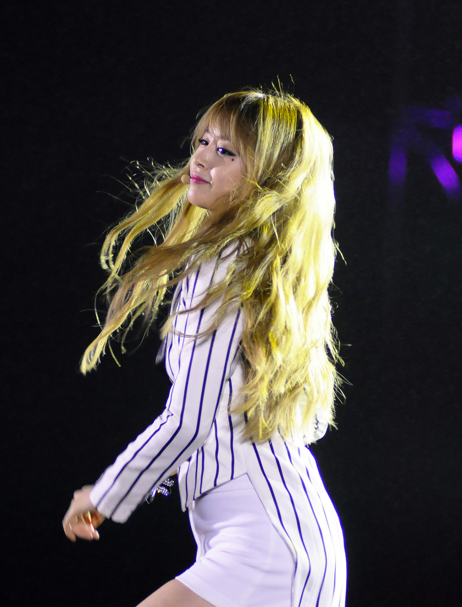 Kpop festival in Vietnam